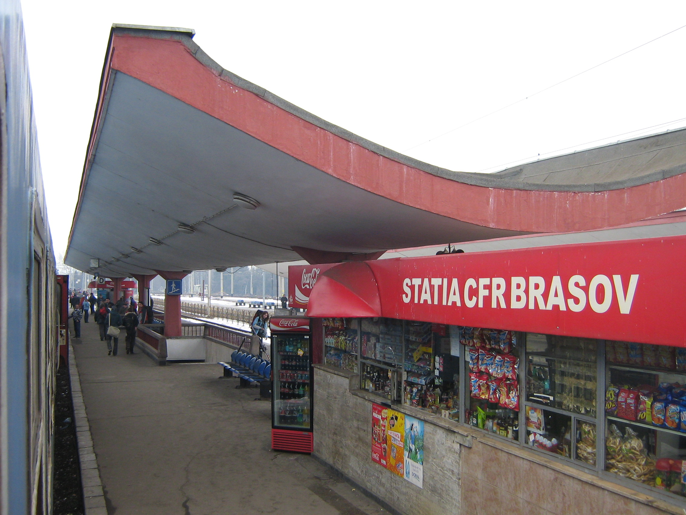 Estación de ferrocarril de Brasov.